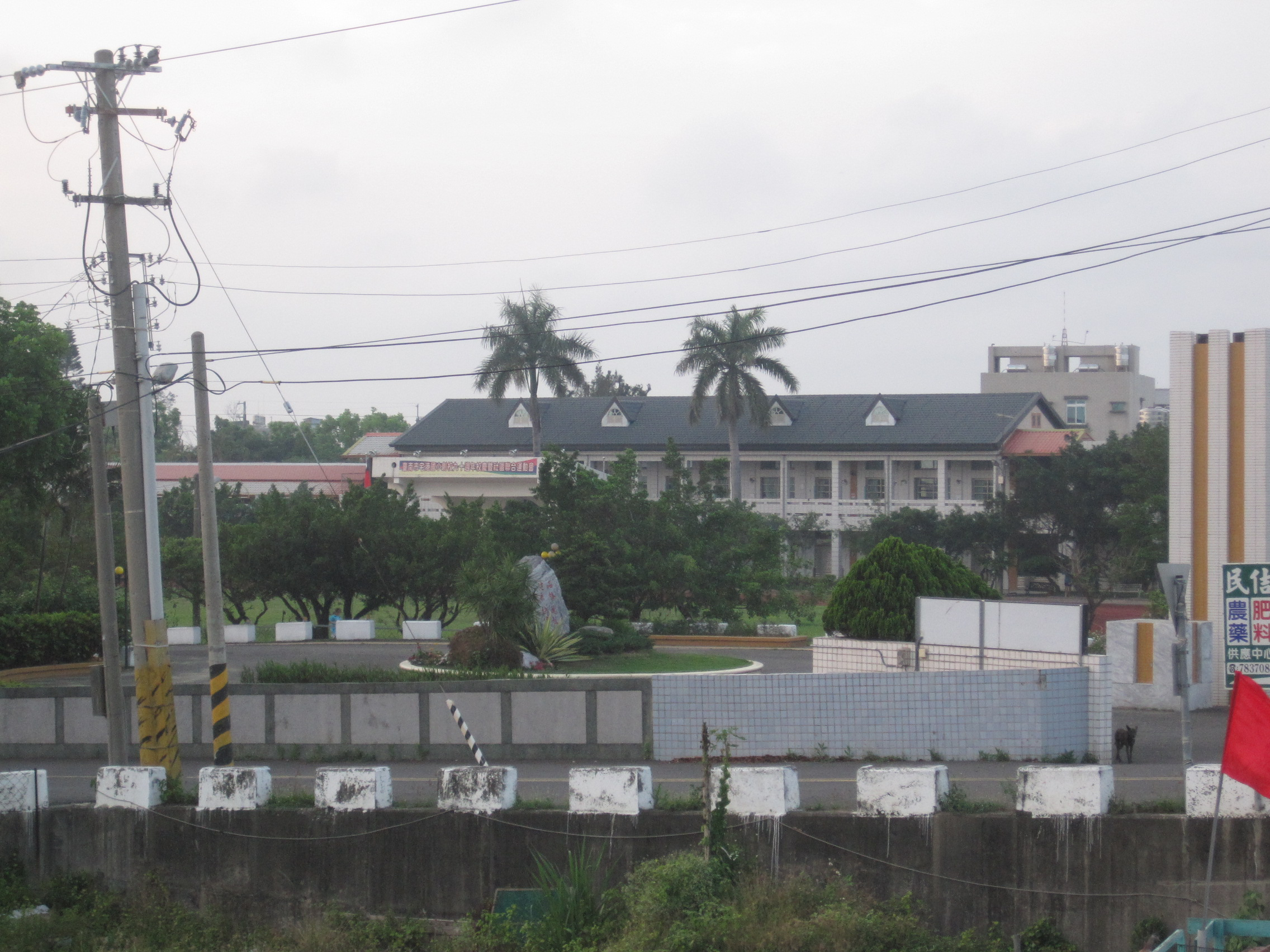 臺南市學甲區宅港國小校舍